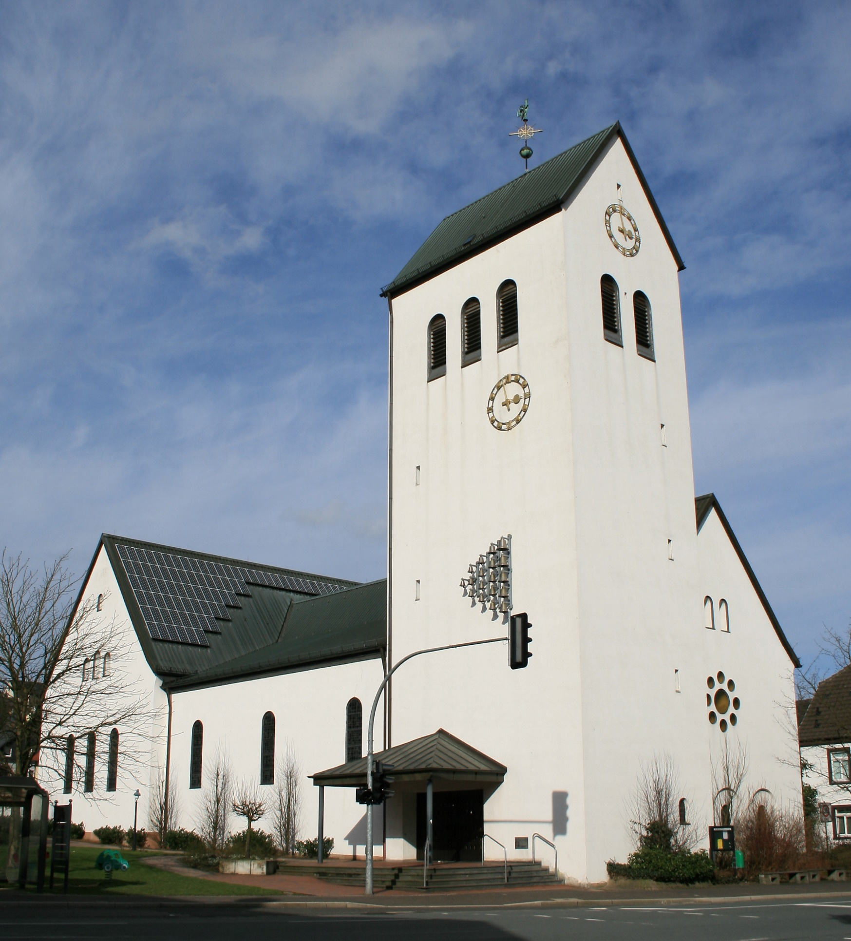 Kirche „St. Maria Heimsuchung“ in Neuenrade.